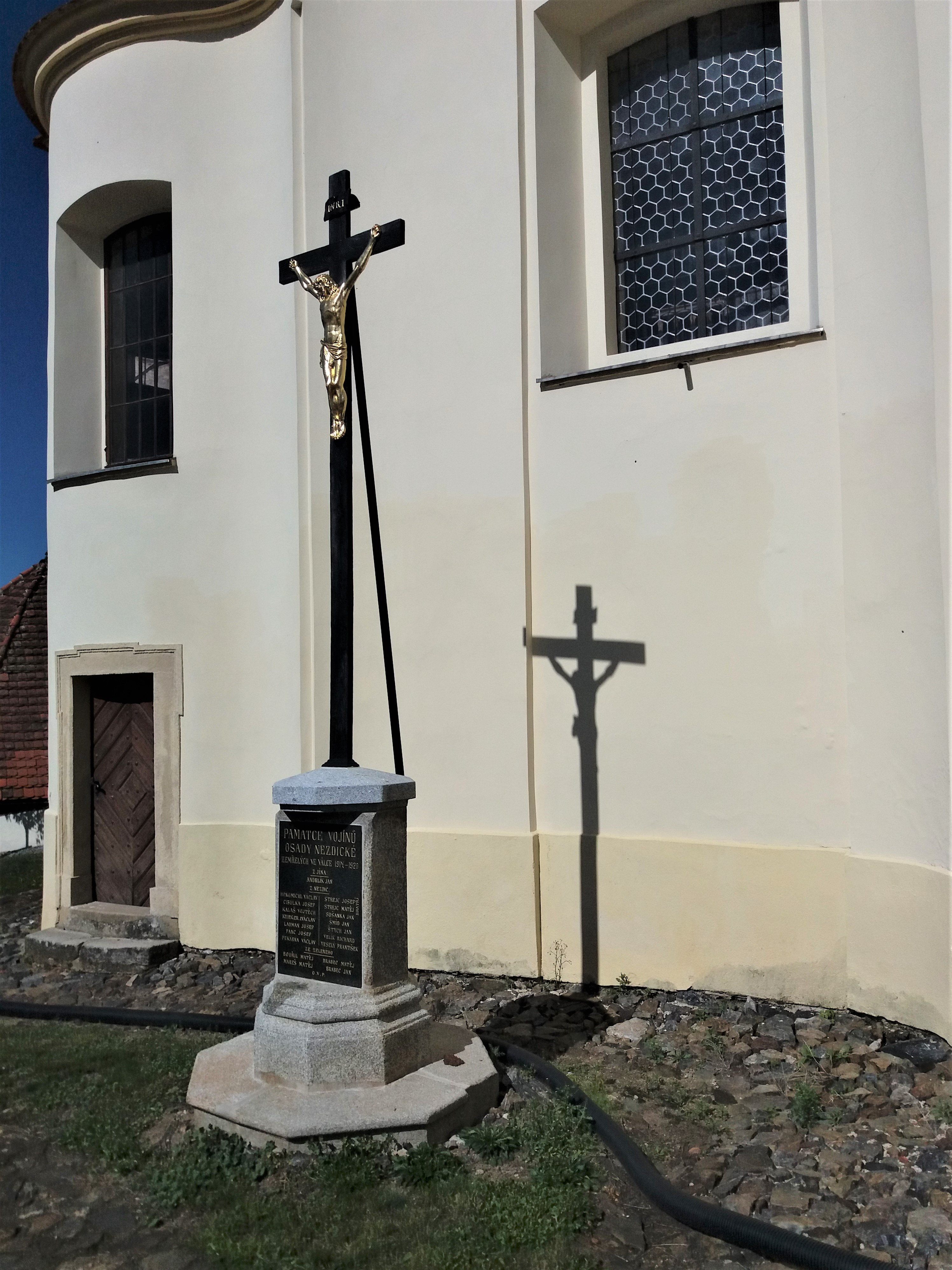 Kříž na památku padlých 1914-1920, ač ve vsi stojí i občanský památník